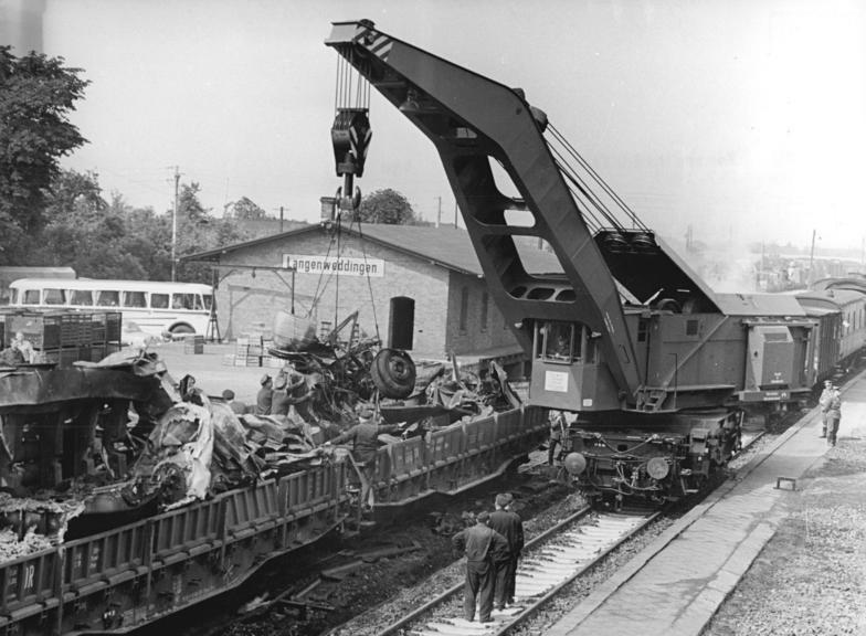 Zentralbild Koard 7.7.1967 Bezirk Magdeburg: Aufräumarbeiten bei Langenweddingen in vollem Gange Seit dem Abend des 6.7.1967 sind Eisenbahner und andere Helfer in ununterbrochenem Einsatz, um die Folgen des tragischen Verkehrsunfalles am Bahnhof von Langenweddingen zu beseitigen und den Reiseverkehr wieder zu normalisieren. 24 Stunden nach dem Unfall passierte ein D-Zug von Halberstadt nach Berlin wieder die Unglücksstelle.